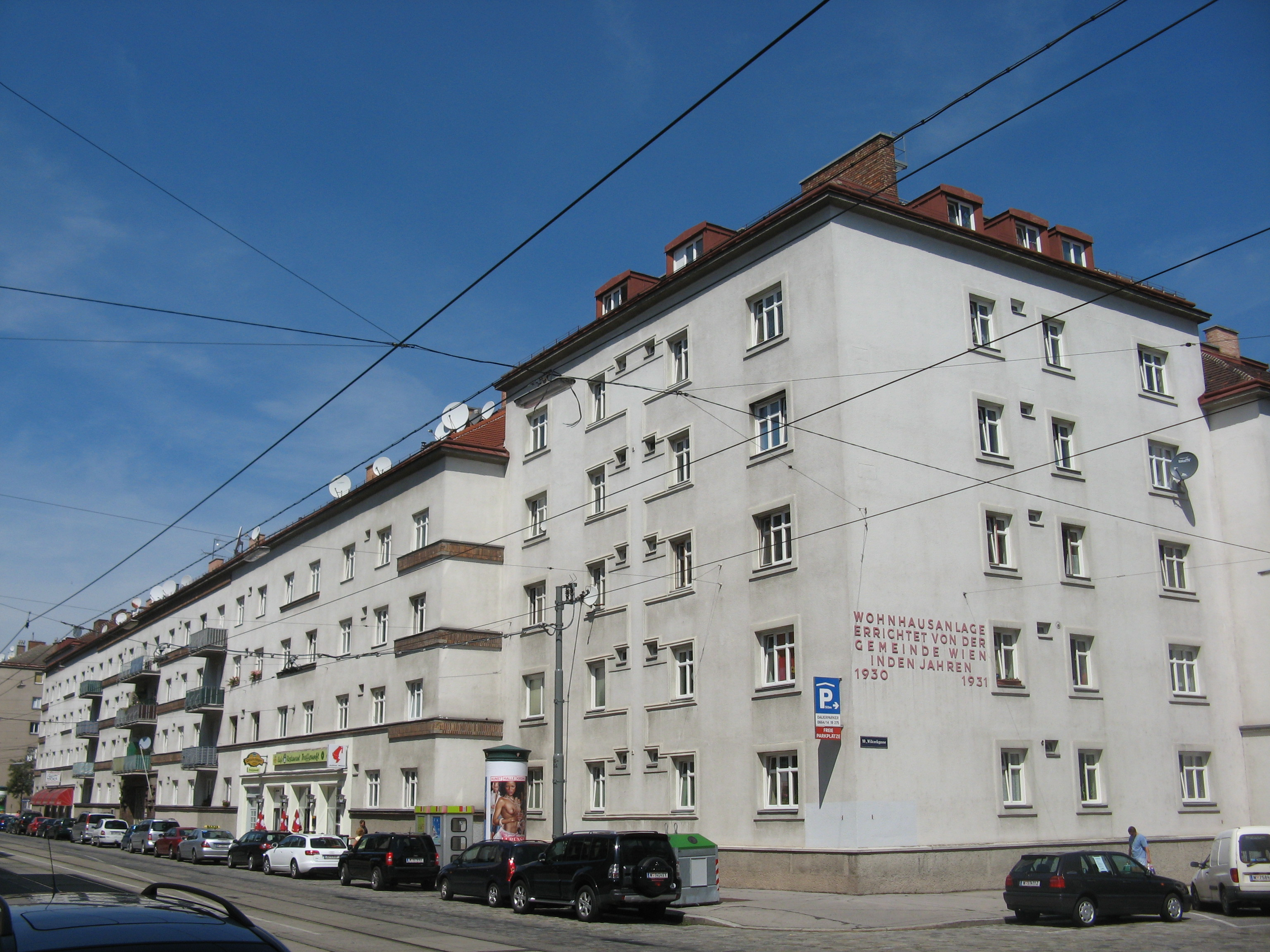 Hueber-Hof (1930-31) von Alfred Chalousch und Heinrich Schopper, Quellenstraße 24B, Wien-Favoriten